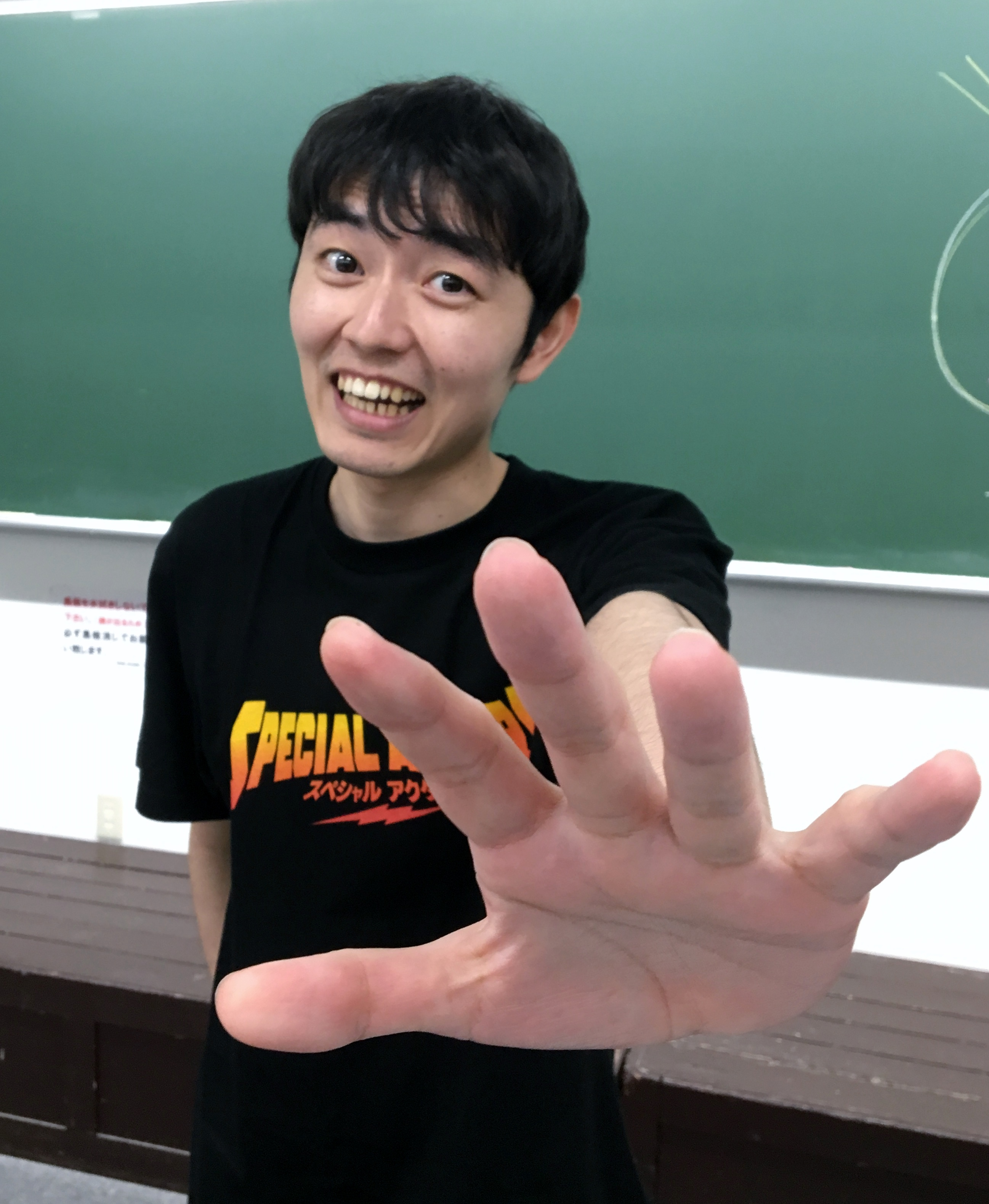 「スペシャルアクターズ ネタバレ全開トークショー」（東京学院ビル3F）に参加した主演 大野和人役の俳優・大澤数人